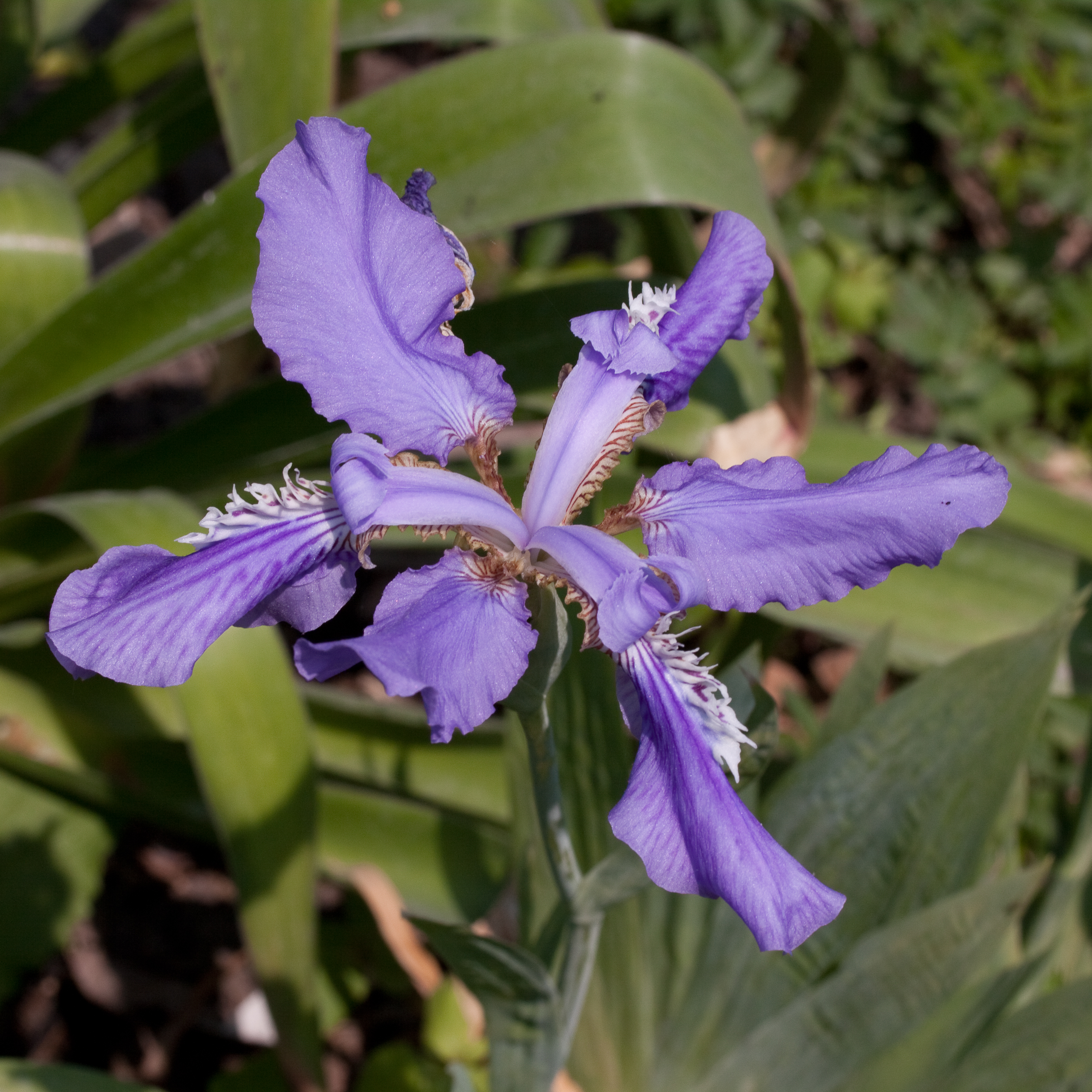 Fleur d'Iris milesii au Jardin des Plantes - Paris